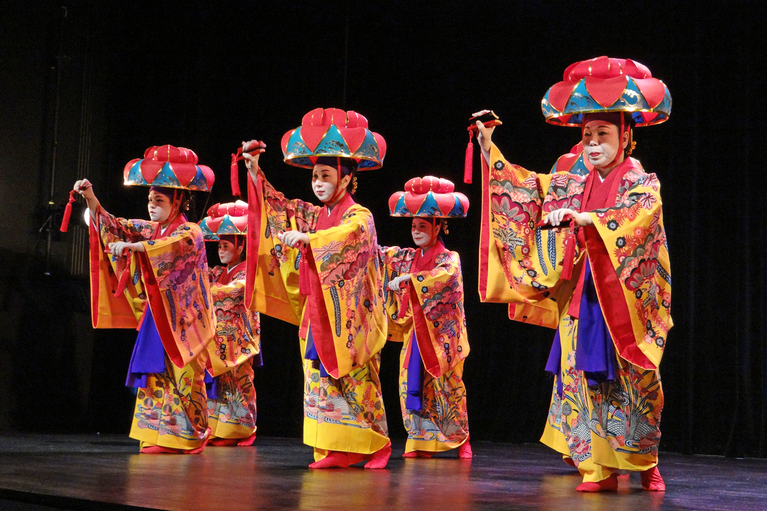 Yotsudake, danse de cour de l'ancien royaume d'Okinawa (Royaume de Ryûkyû : 1429-1879), effectuée lors de l'accueil des Ambassadeurs de Chine, pays avec lequel les liens étaient étroits